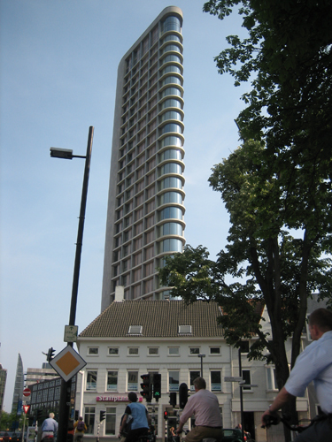 Vestada Toren Eindhoven.